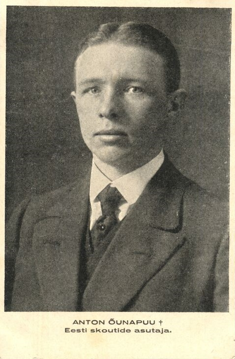 Anton Õunapuu